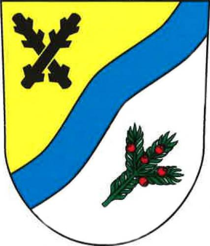 znak, Krompach, okres Česká Lípa